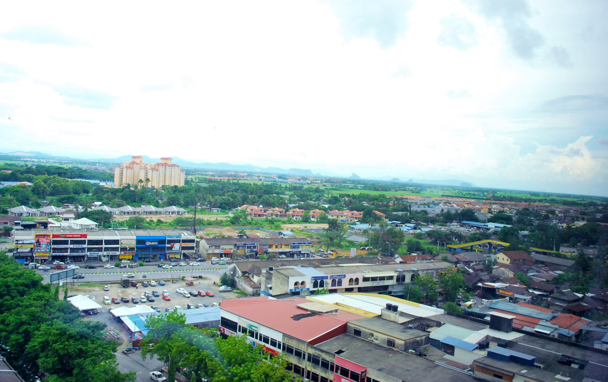 dari udara